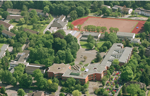 Luftaufnahme des ev. Schulzentrums Hilden. Auffällig ist der Sternförmige Haupteingang, welcher gleichzeitig der Verbindungspunkt zwischen der Realschule und dem Gymnasium ist.